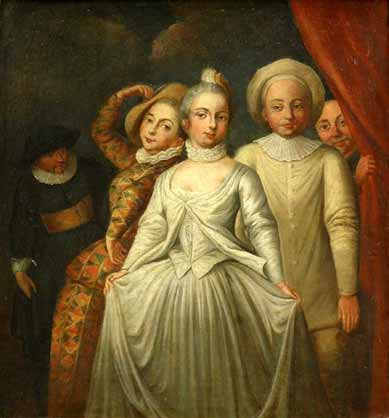 Französische Komödianten